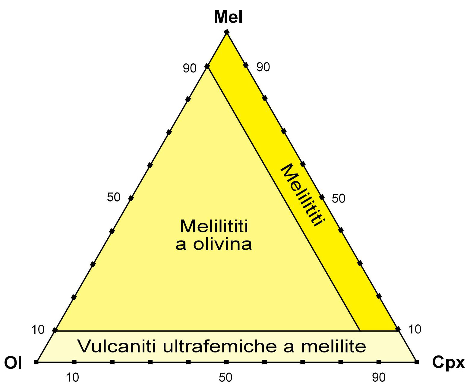 Nomenclatura modale delle rocce a melilite sulla base del rapporto volumetrico percentuale tra olivina, clinopirosseno e melilite